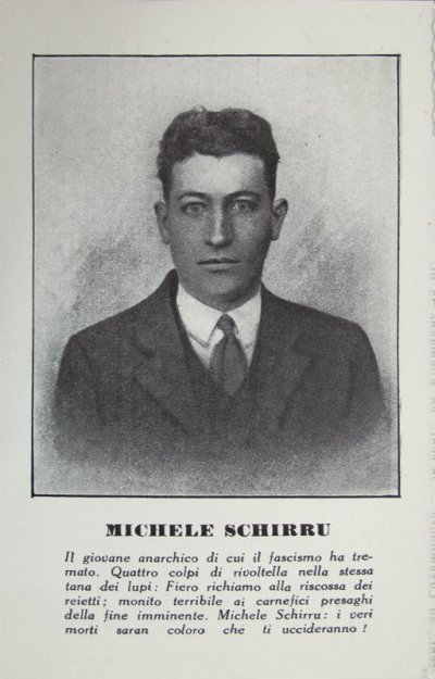 Michele Schirru, né à Padria en Sardaigne le 19 octobre 1899, mort à Rome le 29 mai 1931) est un anarchiste italo-américain, auteur d'un projet d'attentat contre Benito Mussolini.